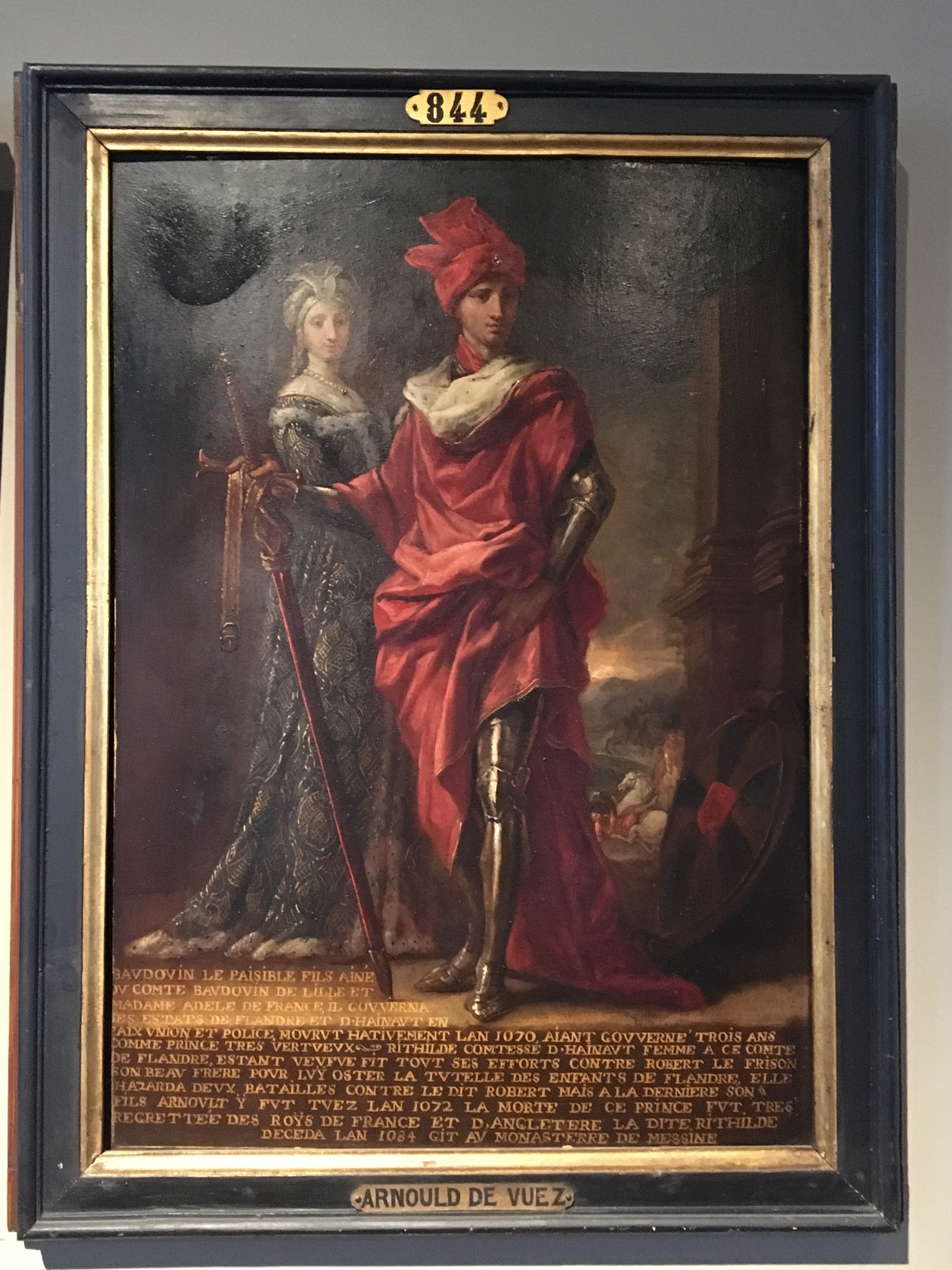 Boudouin VI Le Paisible et Richilde de Hainaut